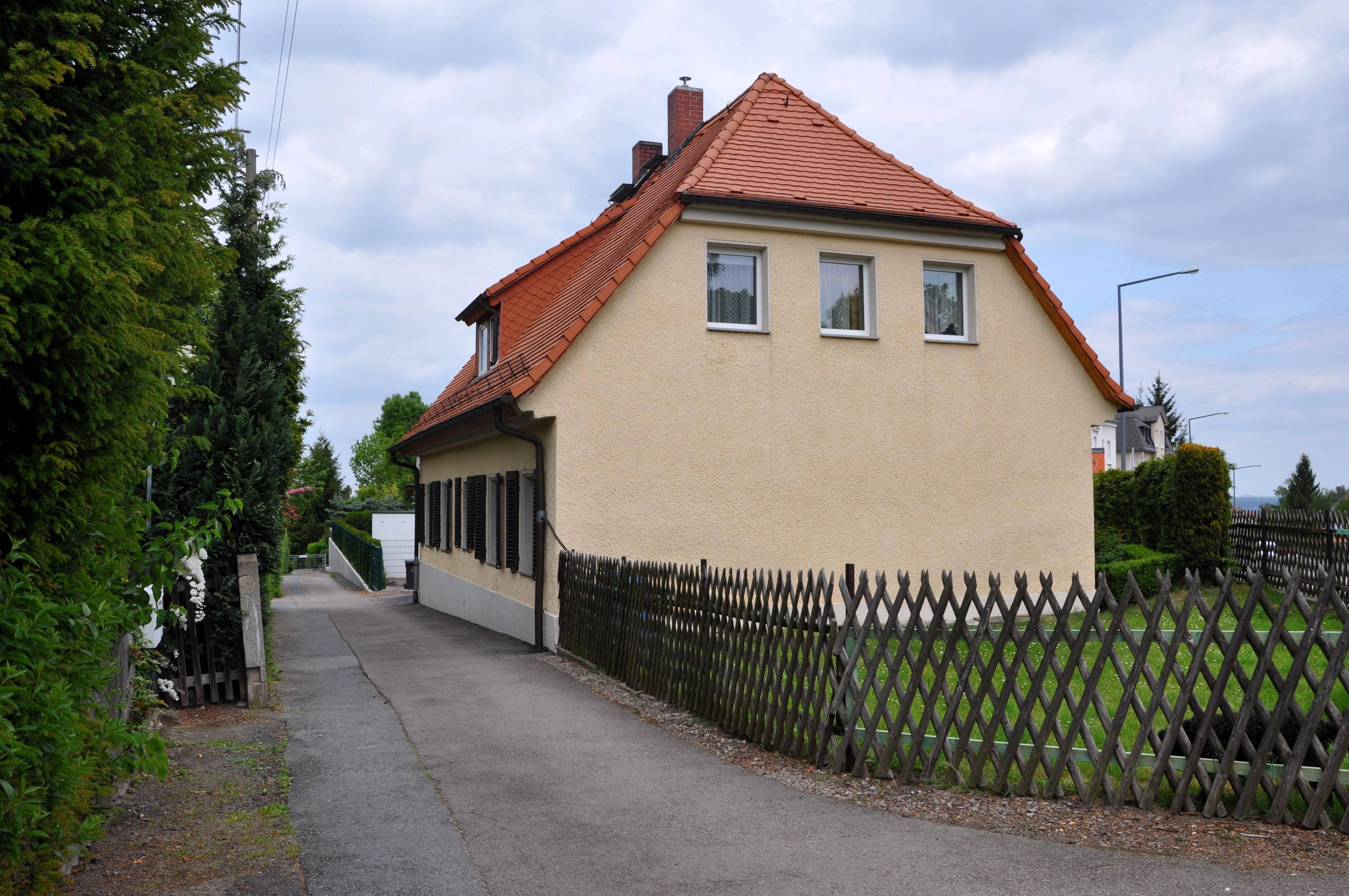 Huthaus des früheren Meiselschachtes, Dresden-Gittersee, Karlsruher Straße 126